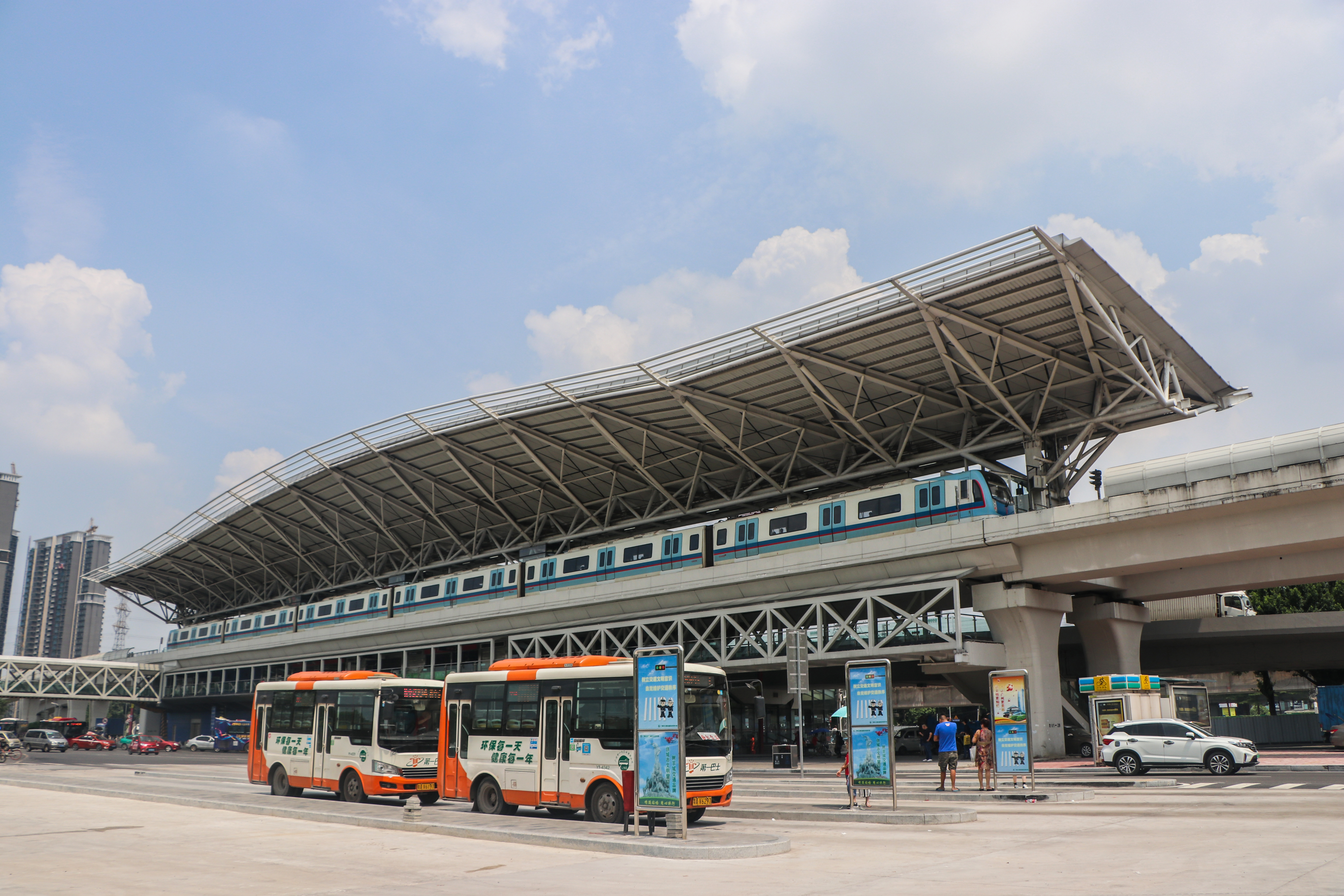 广州地铁坦尾站